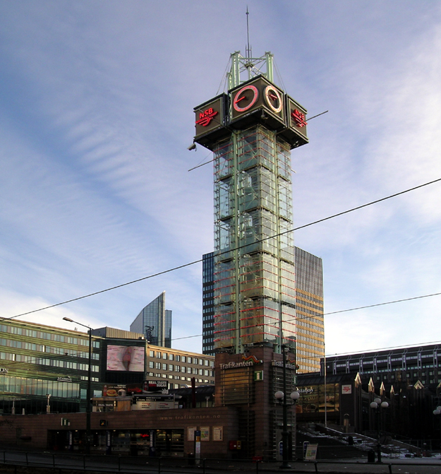 Trafikanten, Jernbanetorget, Oslo. Built 1987; architect Ola Mové.